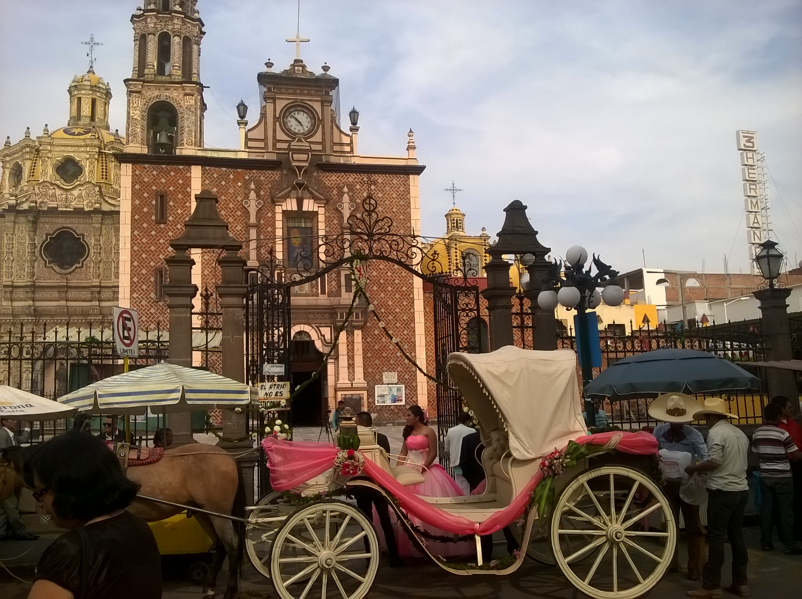 Fiesta de XV Años en la Parroquia de San Martín Texmelucan